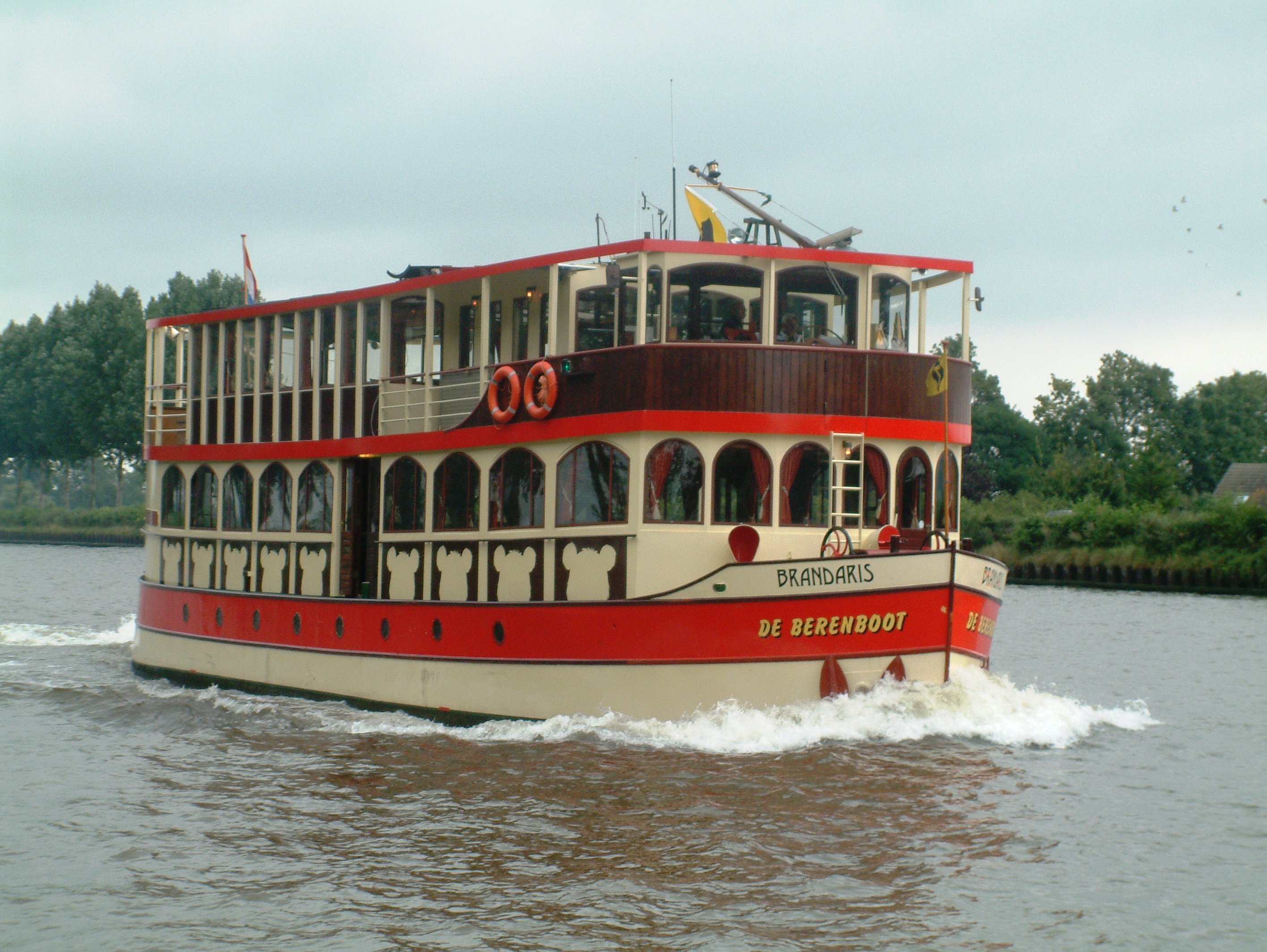 De BRANDARIS, ook bekend als De Berenboot, op het Amsterdam Rijnkanaal.